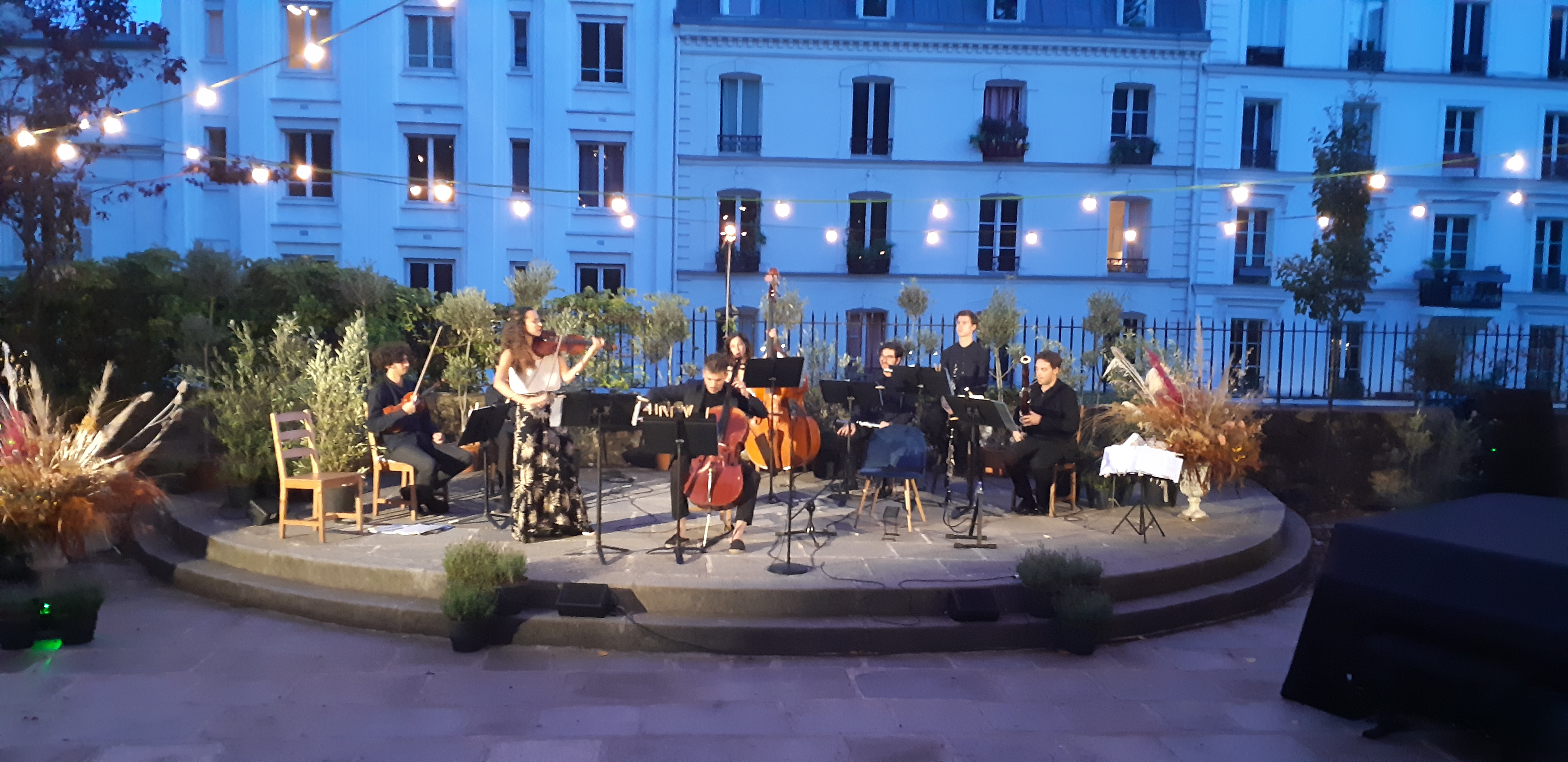 Photo de face d'un concert lyrique en Aout 2019